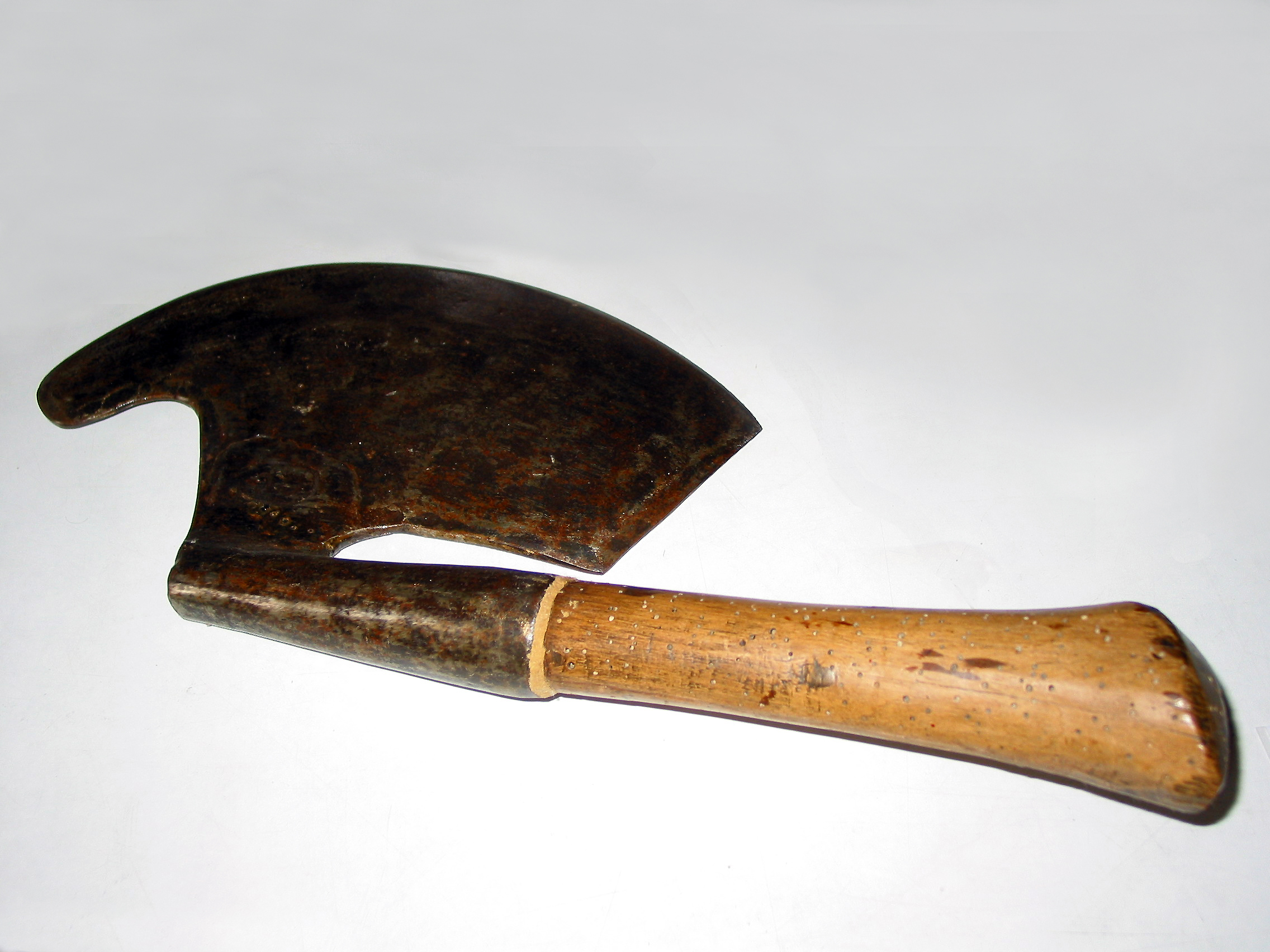 Doloilre de droite - Musée "Vie et travail de nos Aïeux" du château de Trazegnies.